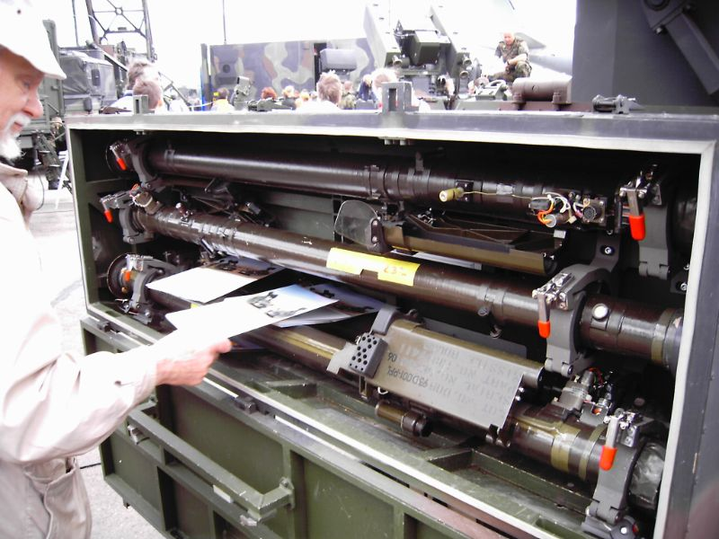 Drei Stinger-Flugabwehrraketen an einem Wiesel-Panzer.